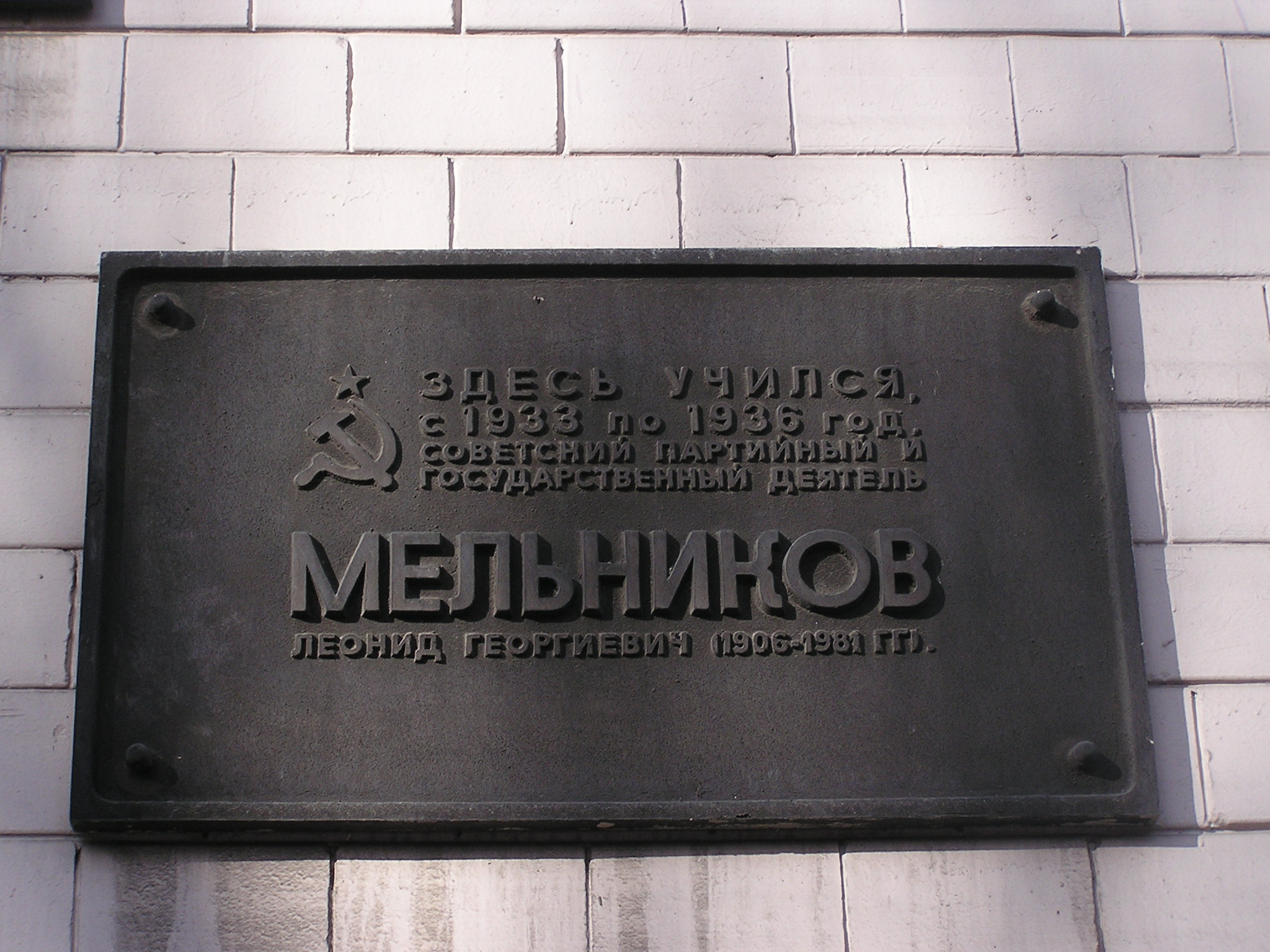 Мемориальная доска в Донецке